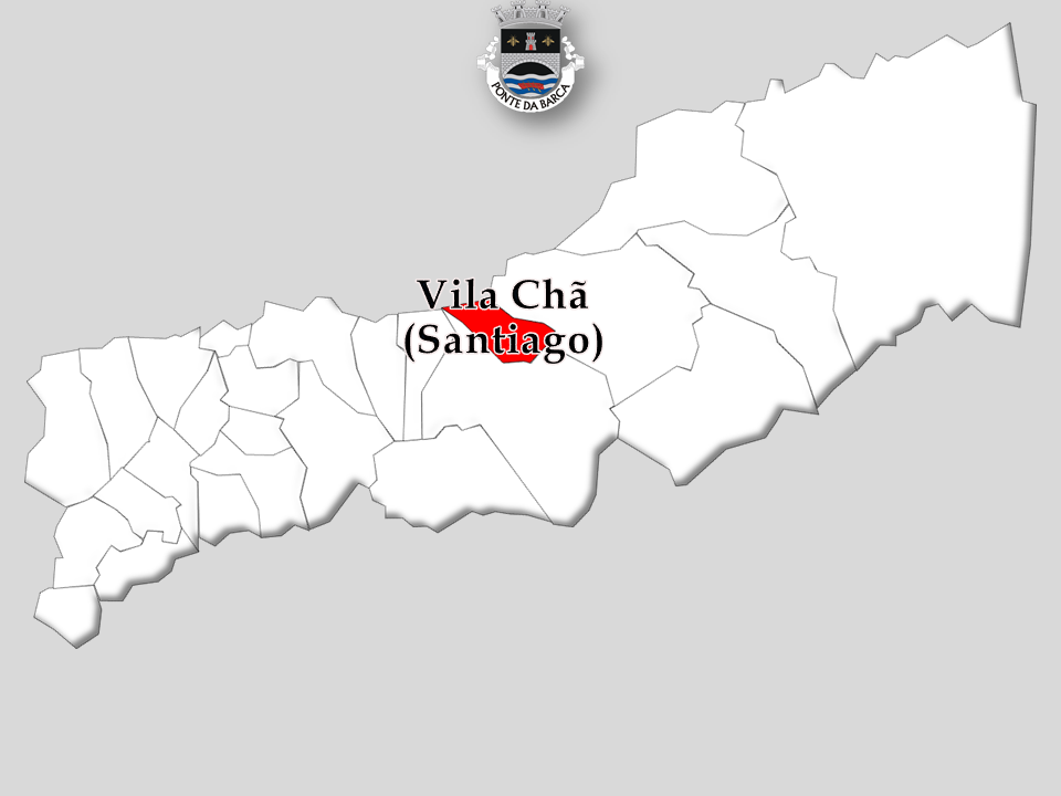 Censos 1864/2011